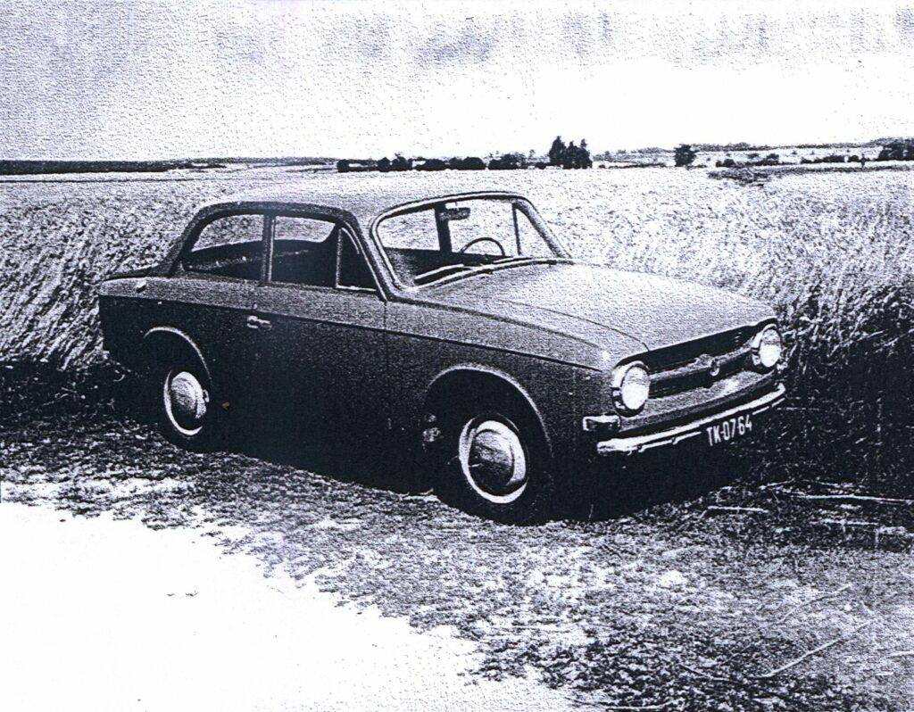 Syrena Laminat, prototyp 002 testowany w ramach badań przez współkonstruktora, inż. Stanisława Łukaszewicza w latach 1966-69